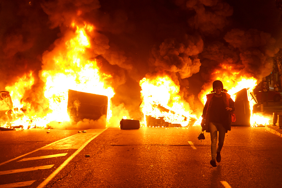 One hour ago in Madrid under General Strike.